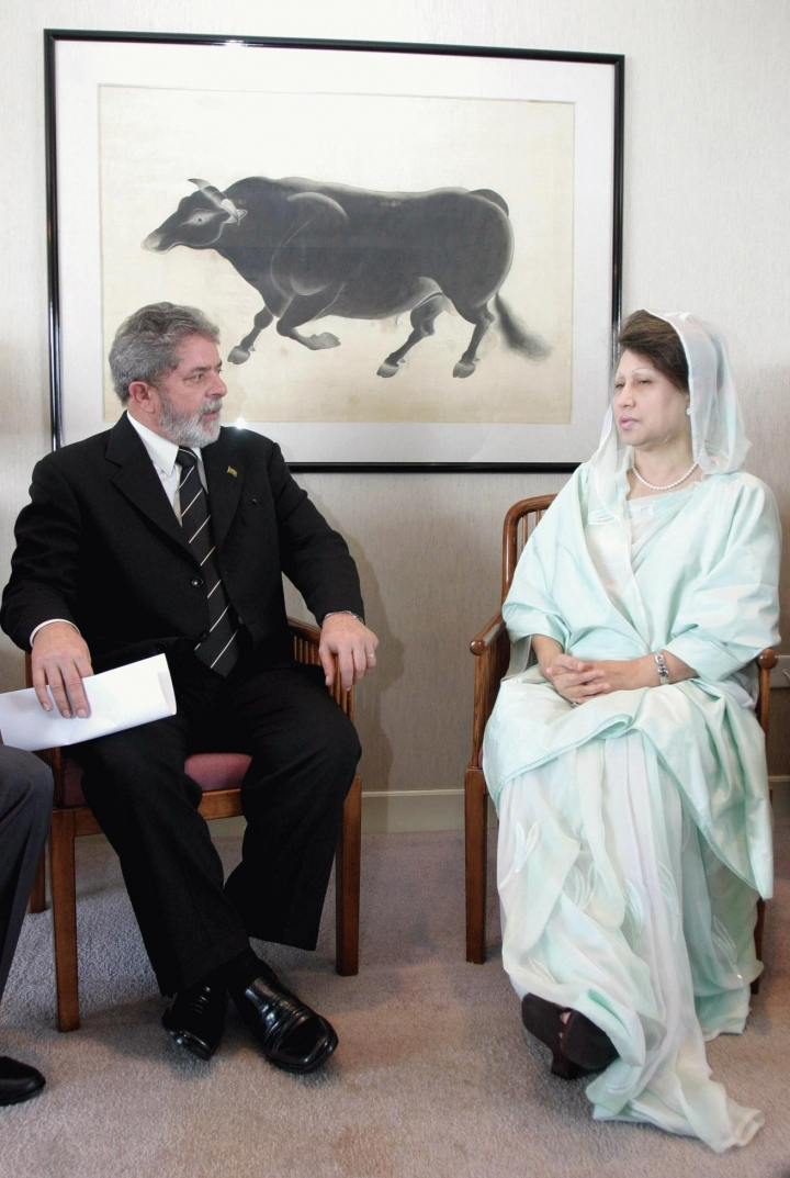 Xangai - O presidente Lula reúne-se com a primeira-ministra da República Popular de Bangladesh, Begum Khaleda Zia. (foto:Antônio Milena)